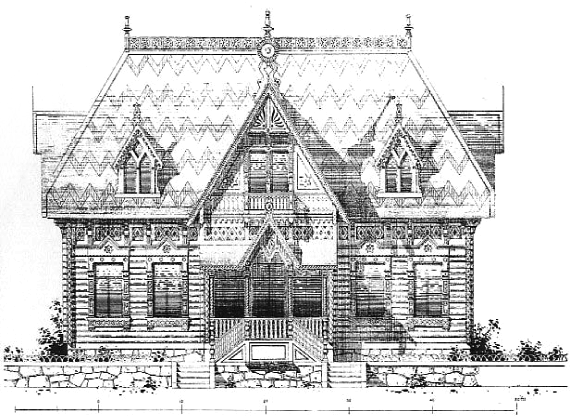 Punschfabrikören Edward Cederlunds (d. 1909) Villa Storholmen i Schweizerstil på Storholmen norr om Lidingö. Byggnaden revs omkring sekelskiftet 1900.